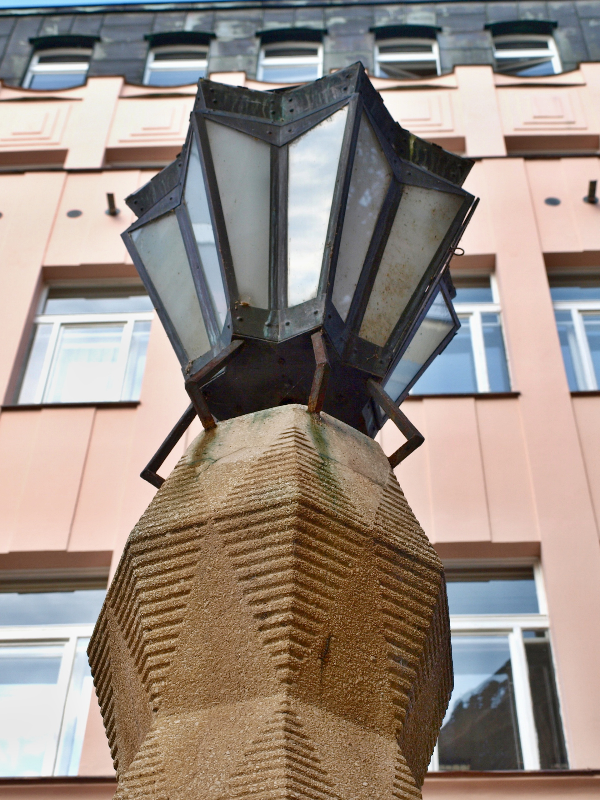 Praha-Nové Město, kubistická pouliční lampa Emila Králíčka